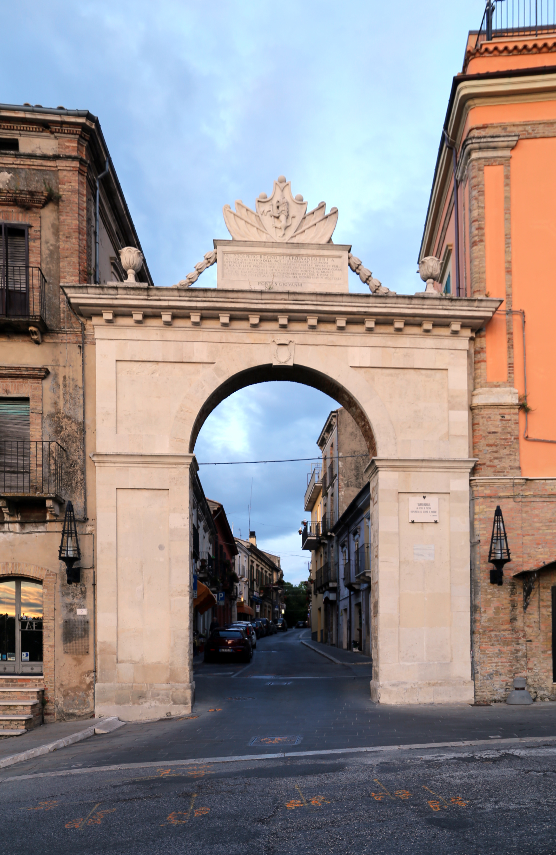 Porta San Giovanni This is a photo of a monument which is part of cultural heritage of Italy.